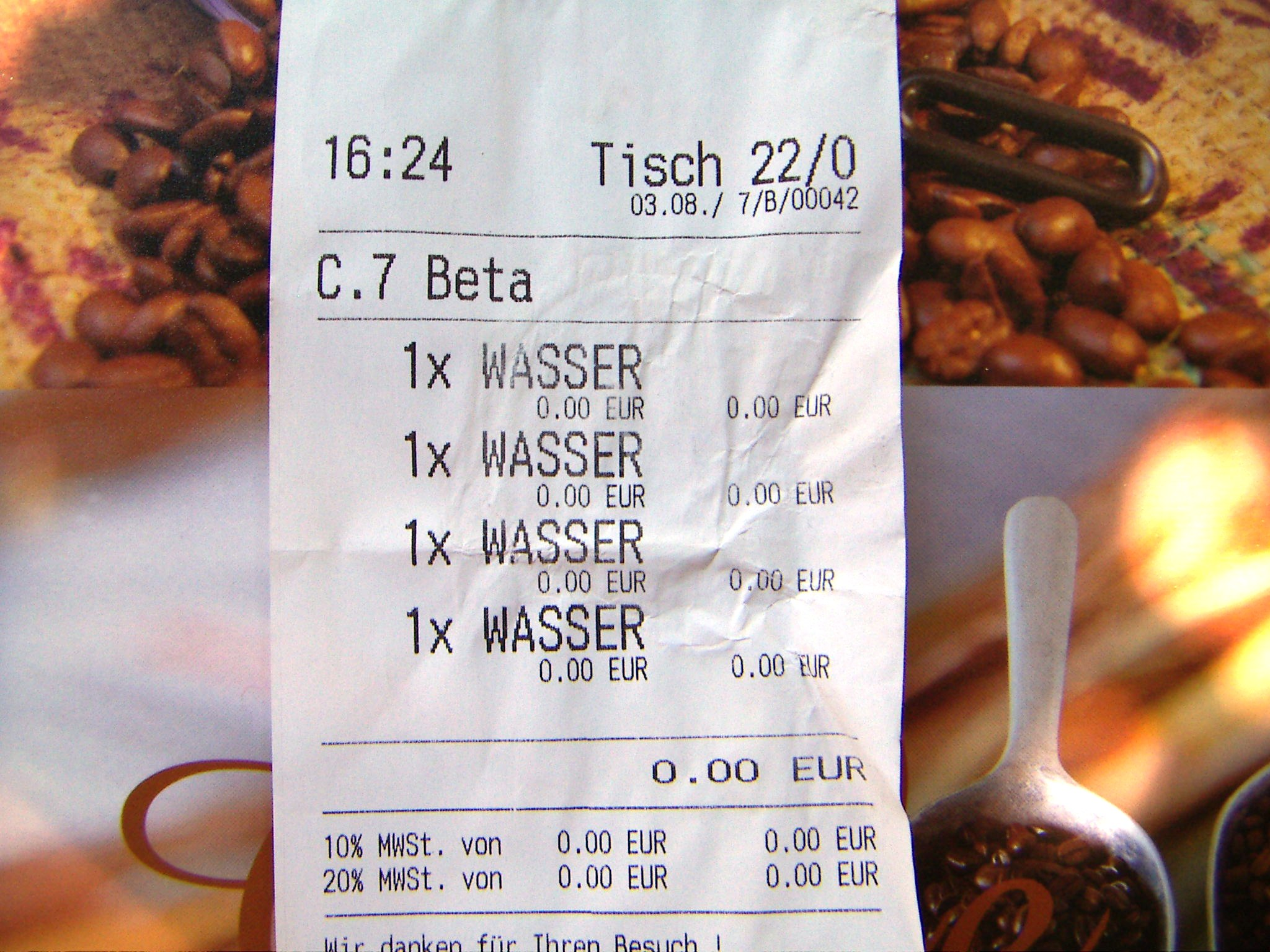 Wien, EisSalon, Kassazettel, WienerWasser